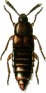 This file has been extracted from another file: Jacobs13.jpg